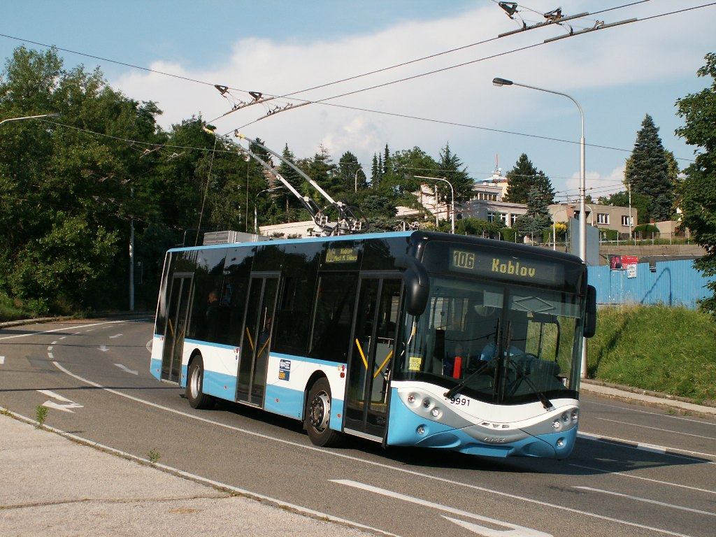 Trolejbus AMZ City Smile 12T